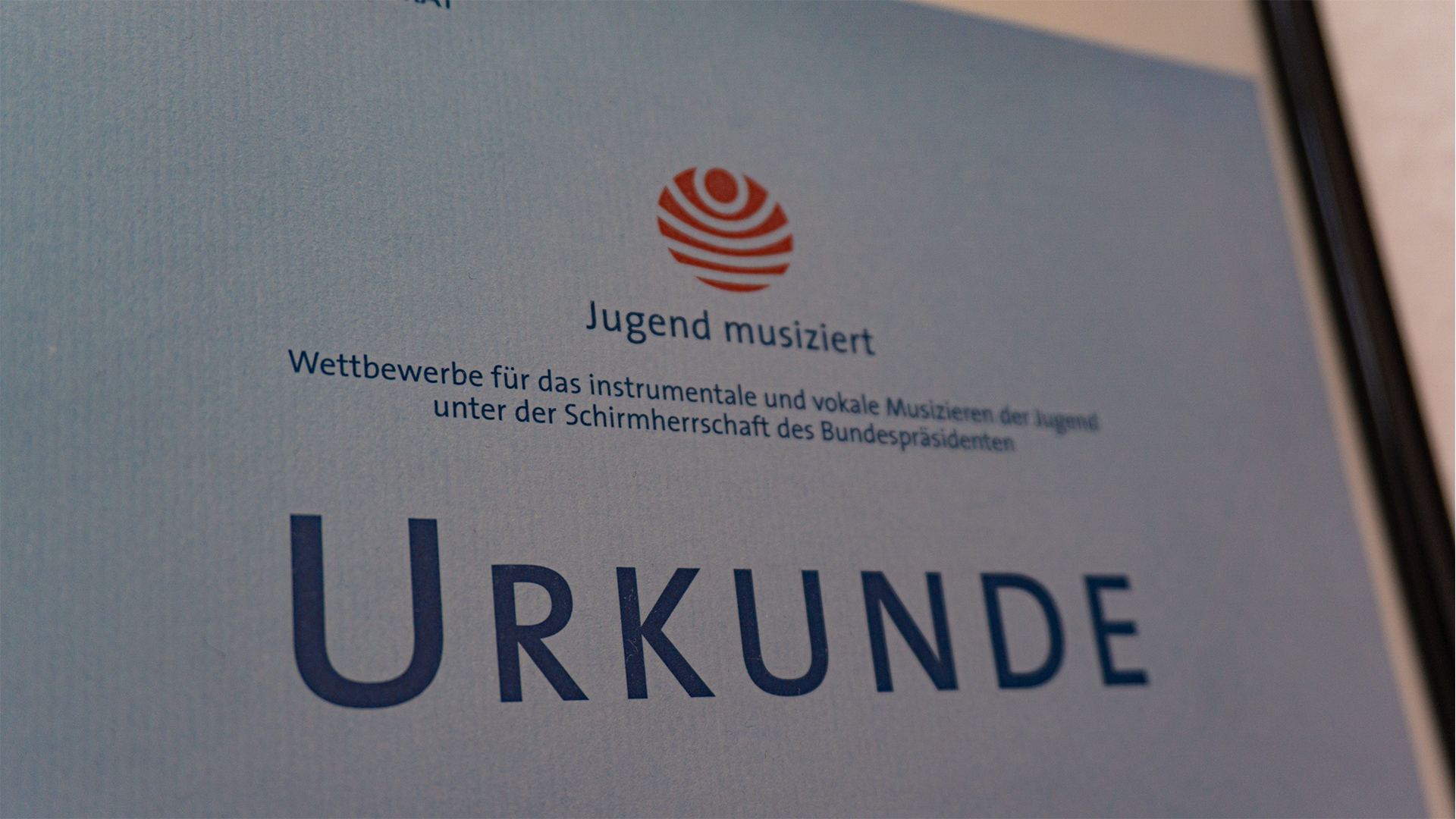 Jugend musiziert Logo auf einer Urkunde vom Landeswettbewerb